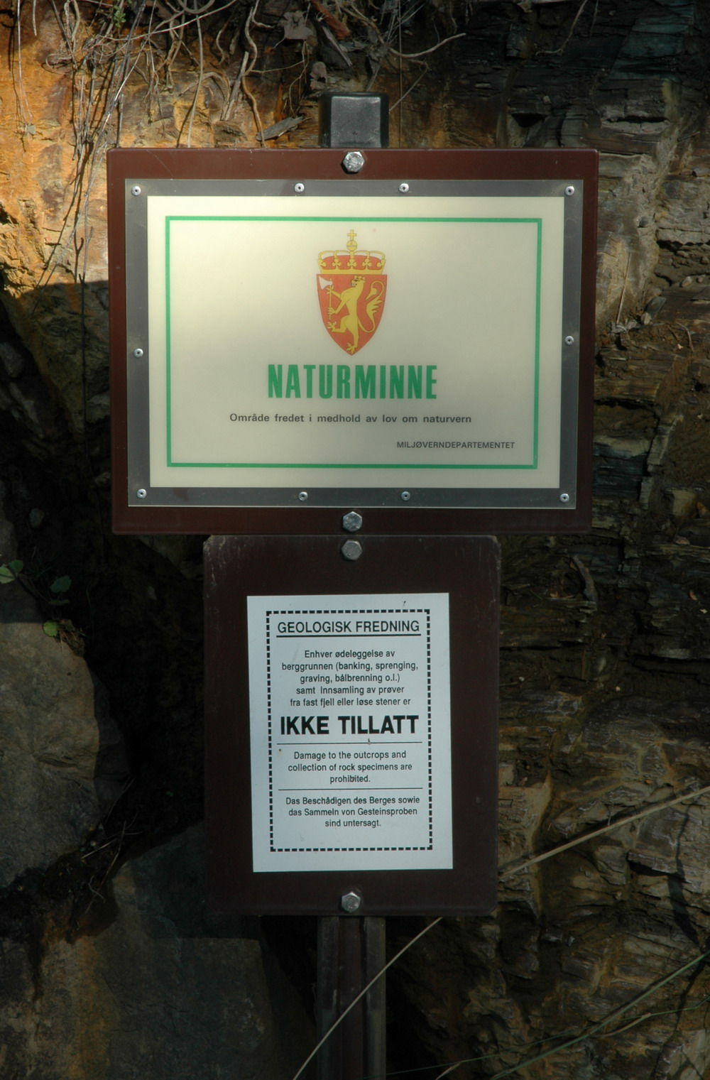 Skilt om naturminne med hjemmel i Lov om naturvern. Mitt eige foto, Kjetil Lenes.